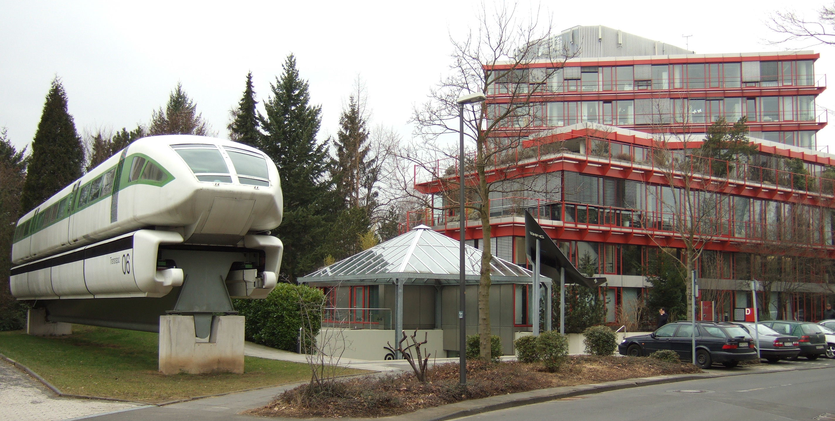 Deutsches Museum – links Modell des Transrapids – im Hintergrund das Wissenschaftszentrum Standort: Ahrstraße Bad Godesberg